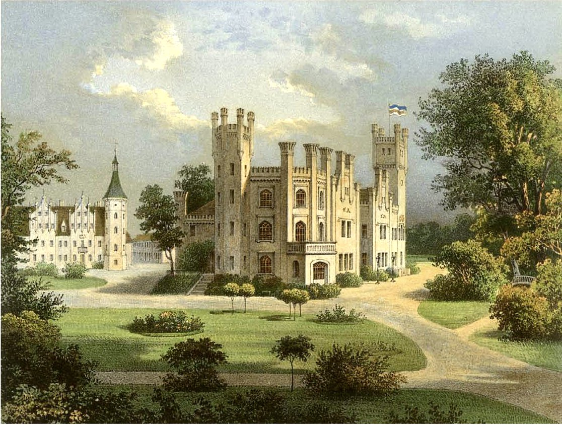 Schloss Primkenau, Kreis Sprottau, Provinz Schlesien